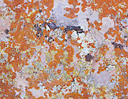 Flechten auf ener Steifläche